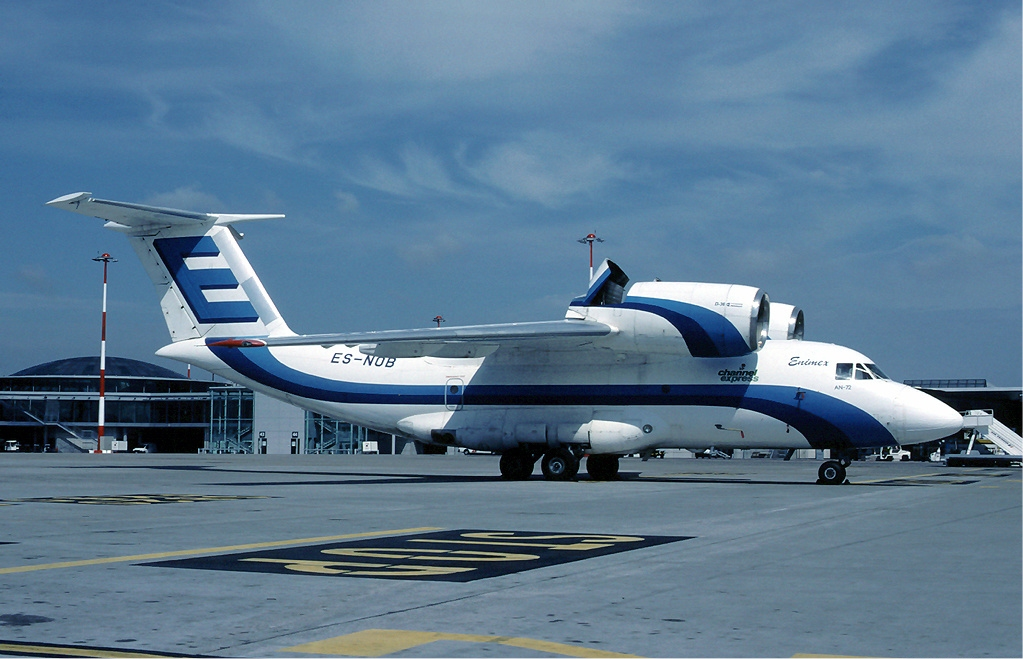 Enimex Antonv An-72